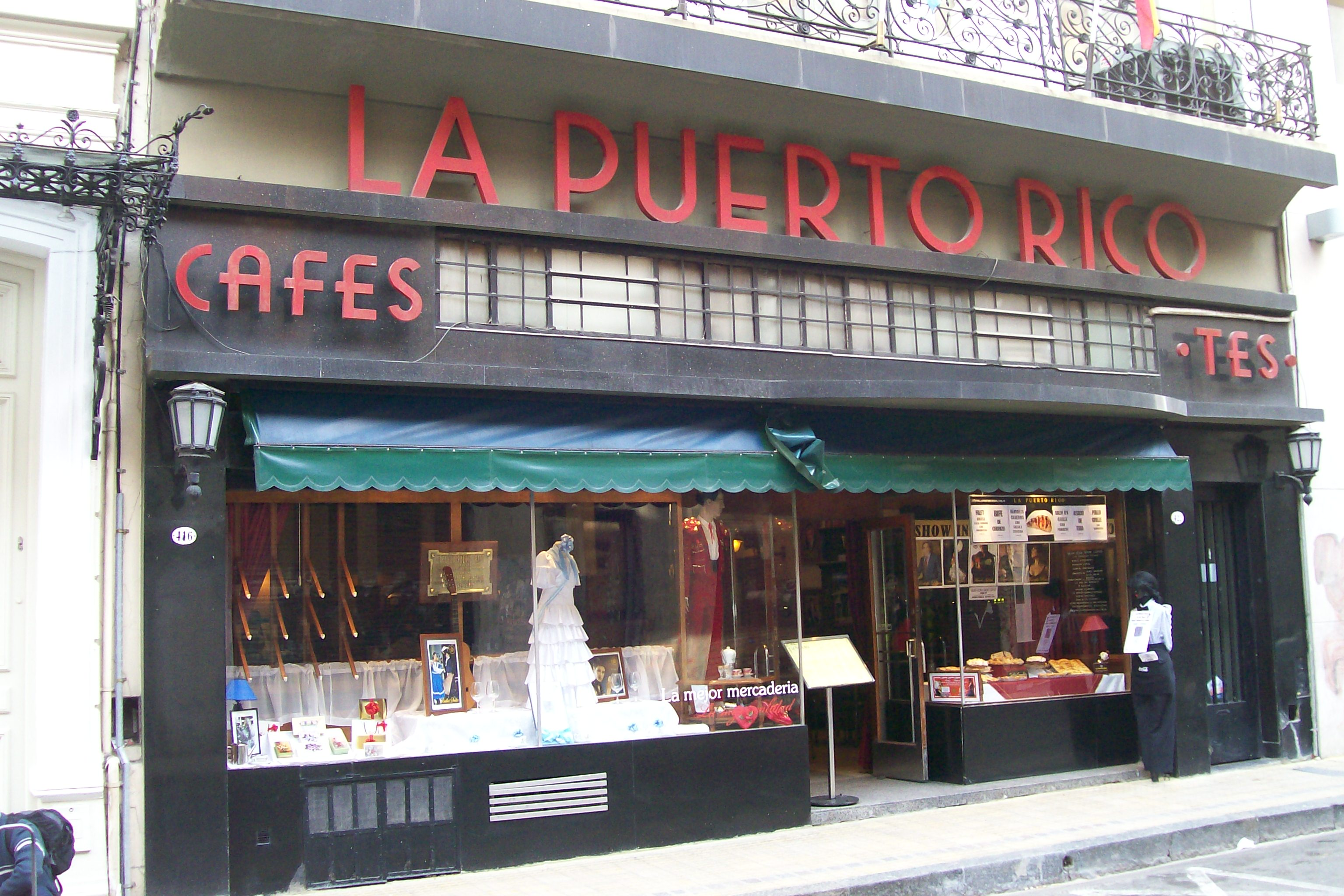 La Puerto Rico, Bar notable de la ciudad de Buenos Aires. Calle Alsina Nº 416.